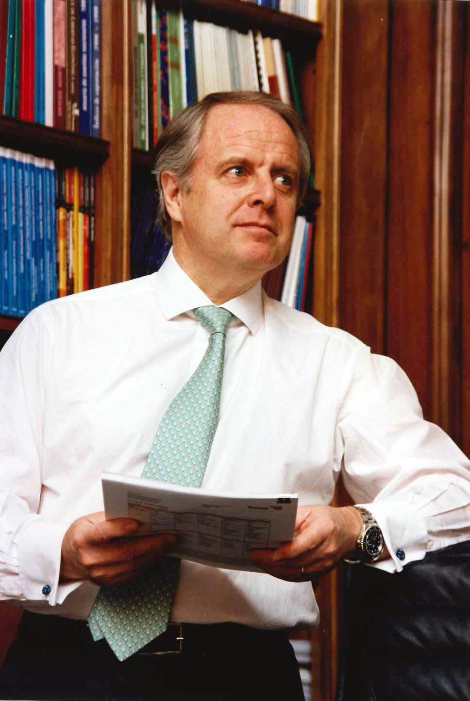 Economista y ex consejero del Banco Central de Chile